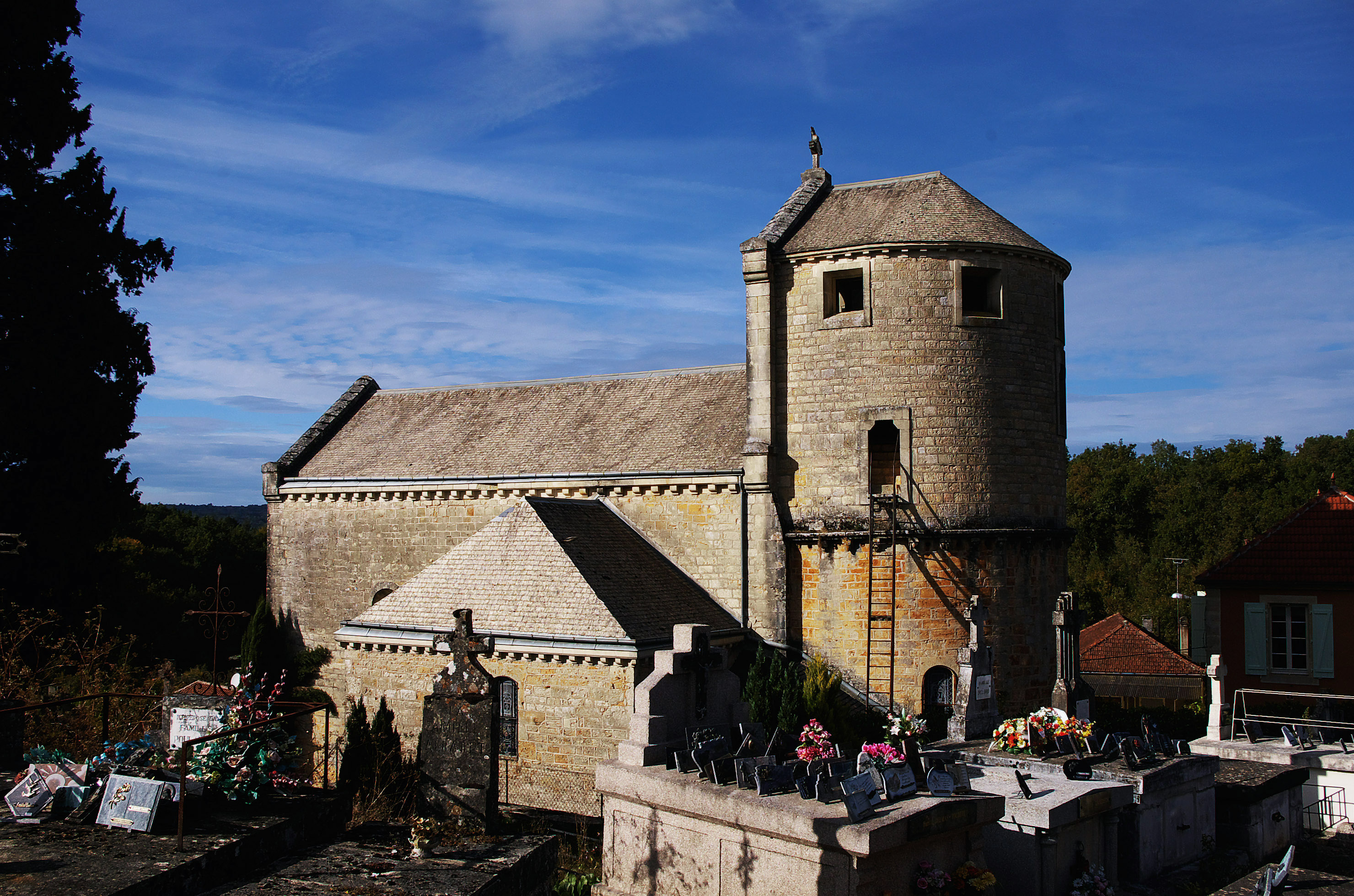 Église Saint-Julien-de-Brioude de Cassagnes